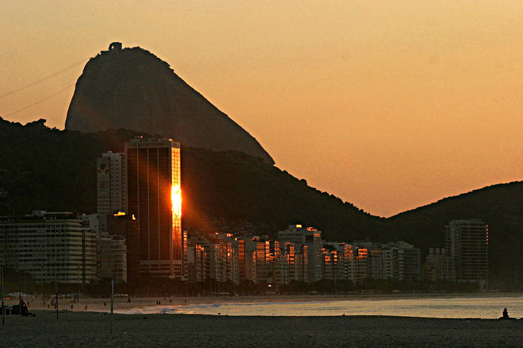 Reflexo dos primeiros raios de sol no edifício do Hotel Merídien que todos os anos promove uma cascata de fogos na comemoração do Ano Novo - Leme - Zona Sul do Rio de Janeiro.